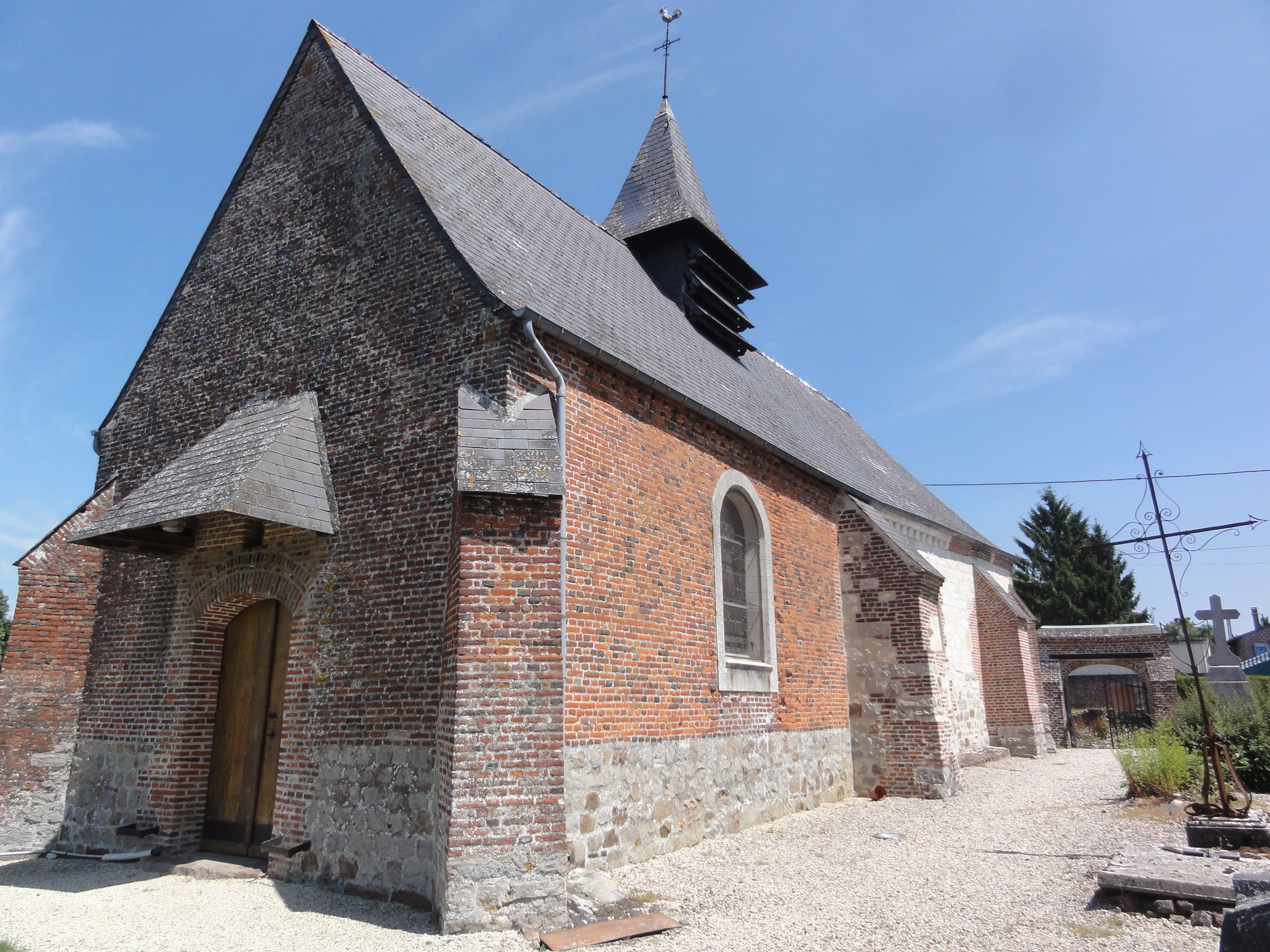 Berlancourt (Aisne) église